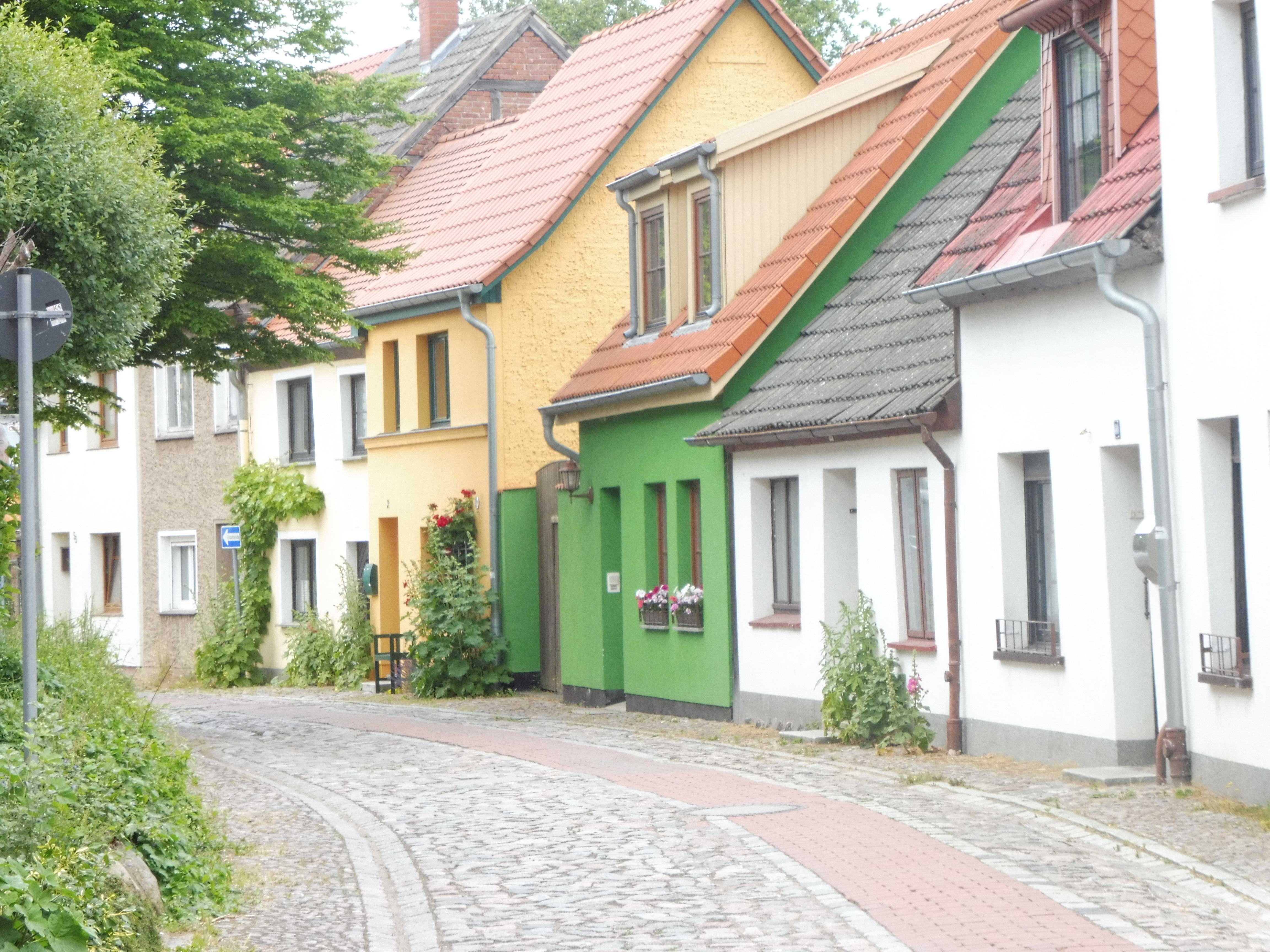 Gartenstraße in Barth